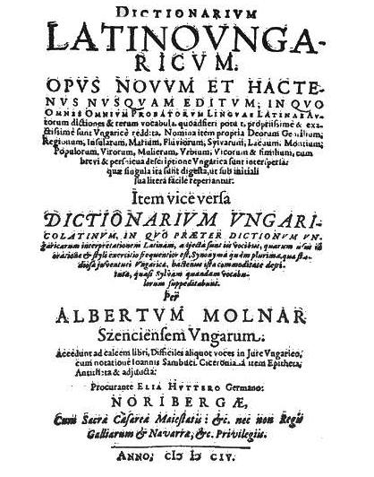 Szenczi Molnár Albert magyar-latin szótára